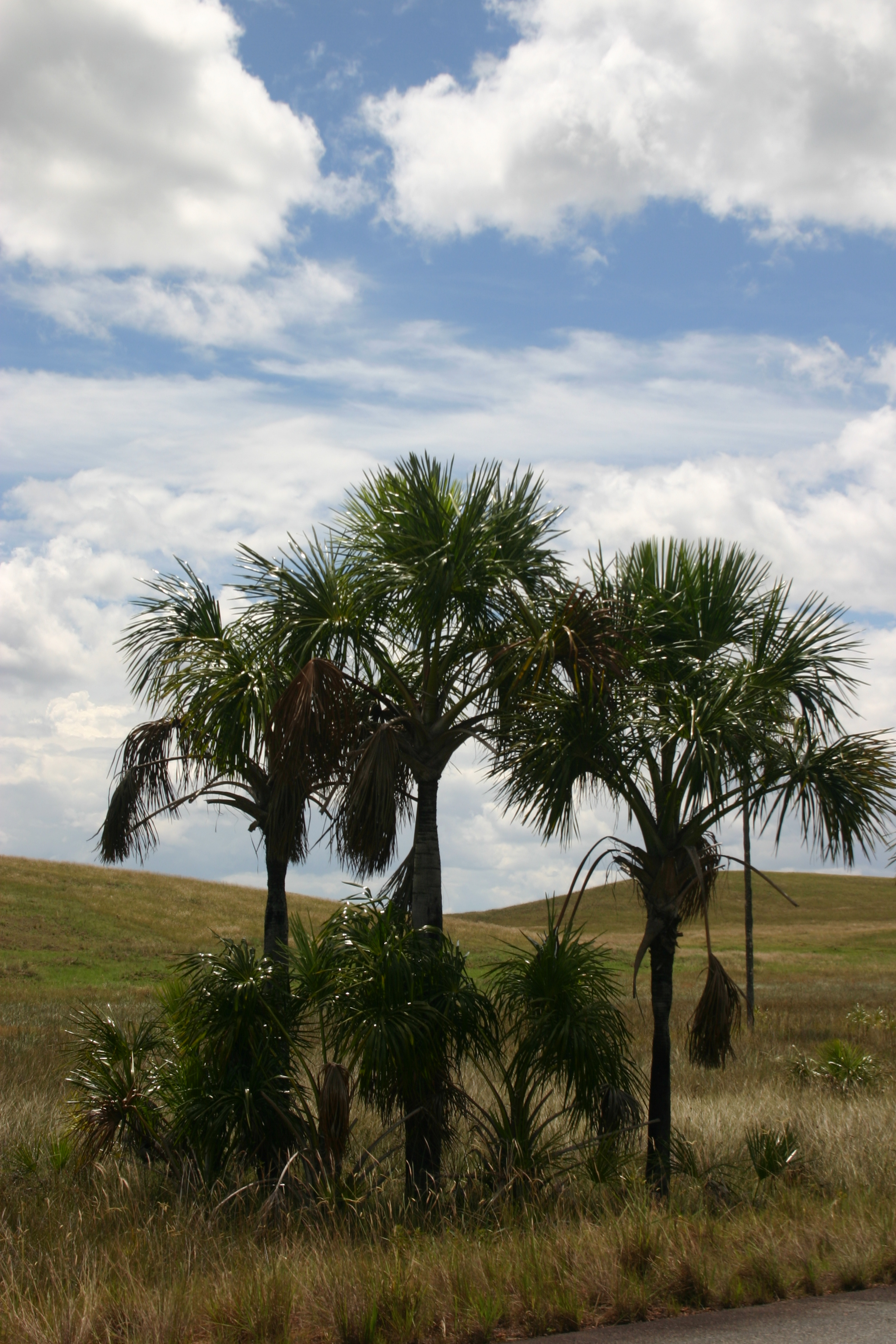 Moriches Jovenes (Mauritia flexuosa)